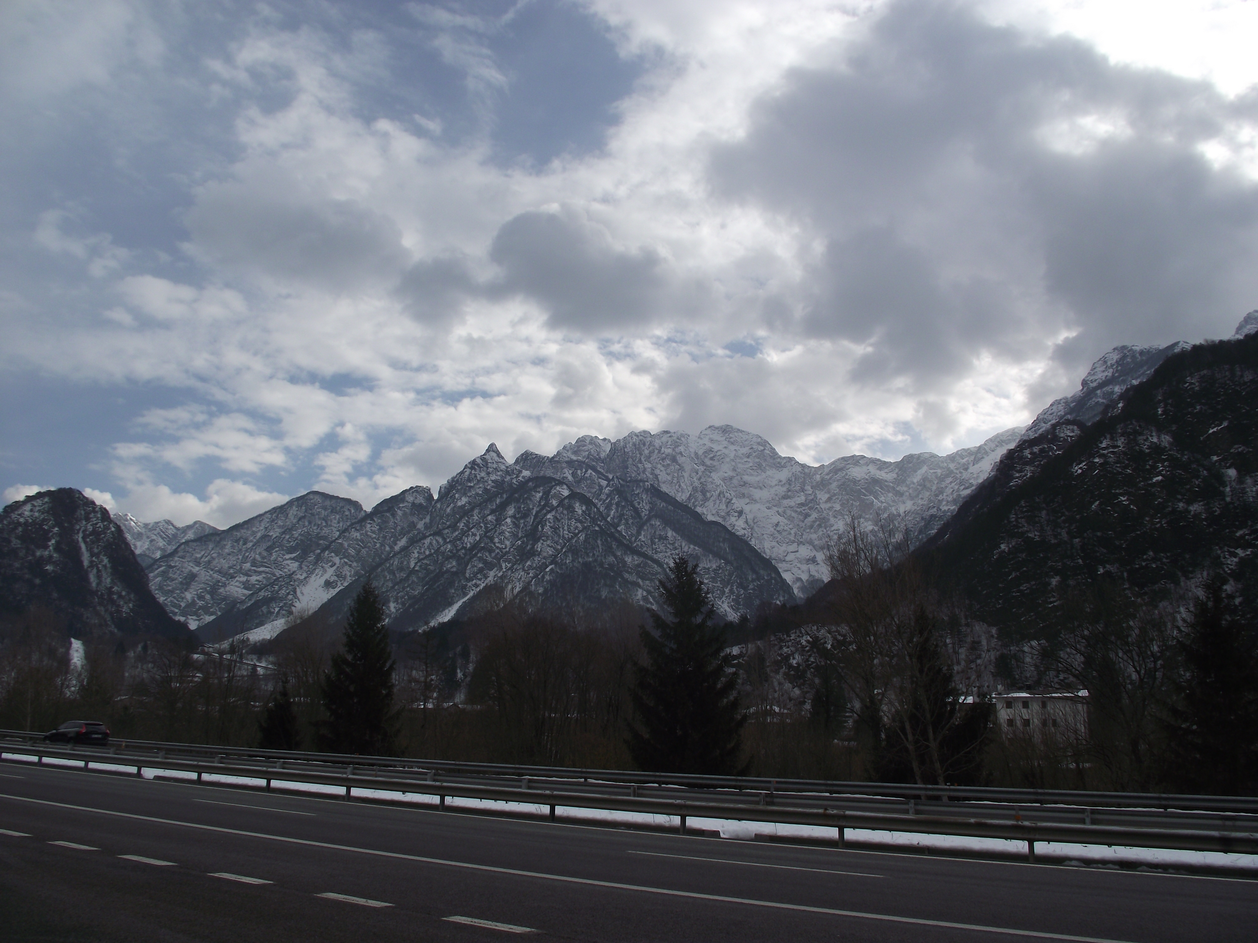 Belca